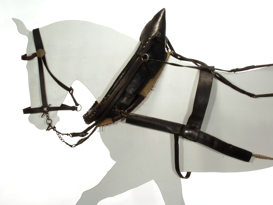 Komplettes Zuggeschirr (Arbeitsgeschirr) für das Stangenroß (rechtes Pferd) eines Zweiergespanns, bestehend aus Hörnerkummet, Kummetpolster, Halfter, Ruckschlag mit Zugsträngen und Zügel.